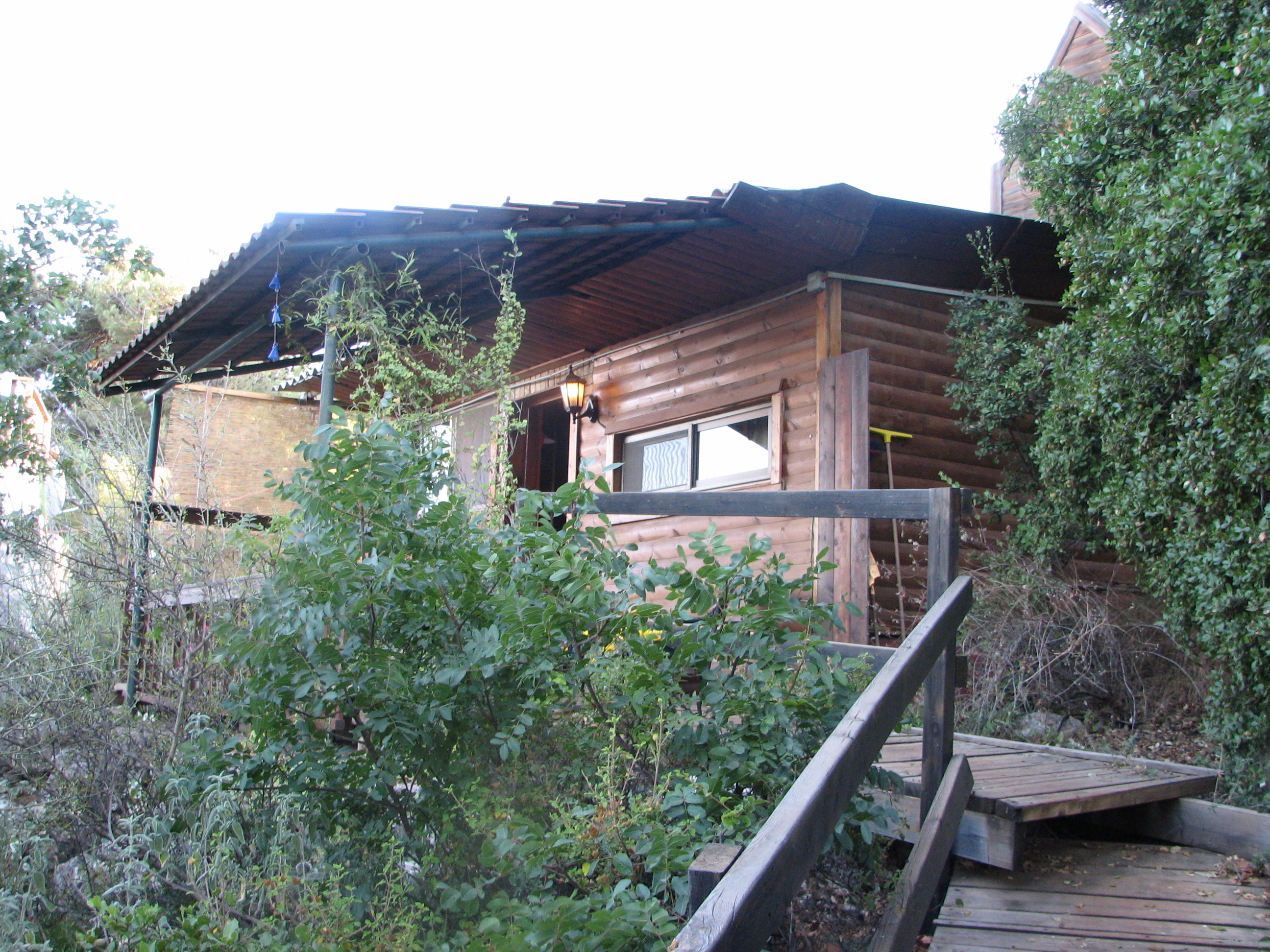 Hemdat Yamim חמדת ימים היא נקודת יישוב השוכנת בלב שמורת הטבע הר מירון, על פסגת הר בגובה 800 מטר מעל פני הים. במקום מתגוררת משפחה אחת ויש בה כמה חדרי ארוח, מסעדה ואולם קטן למופעים וקונצרטים. הגישה היחידה אל היישוב היא דרך כביש היוצא מהיישוב שפר